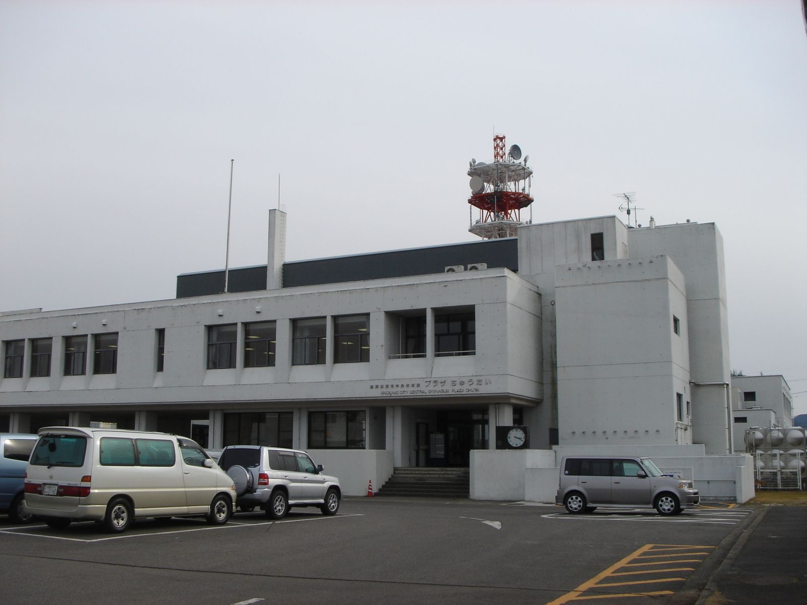 (美濃加茂市中央体育館プラザちゅうたい),Minokamo,Gifu,Japan(岐阜県美濃加茂市)で撮影。